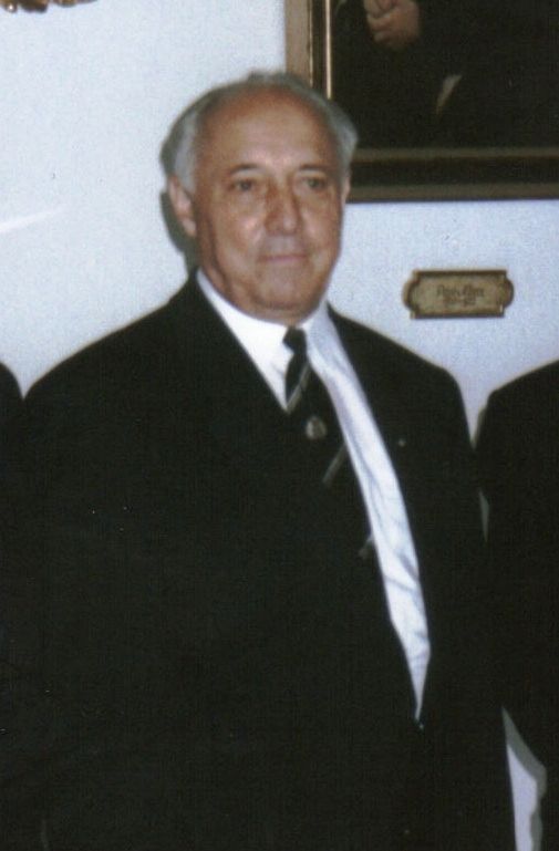 Otto Wahl bei seinem 40. Priesterjubiläum im Kloster Benediktbeuern